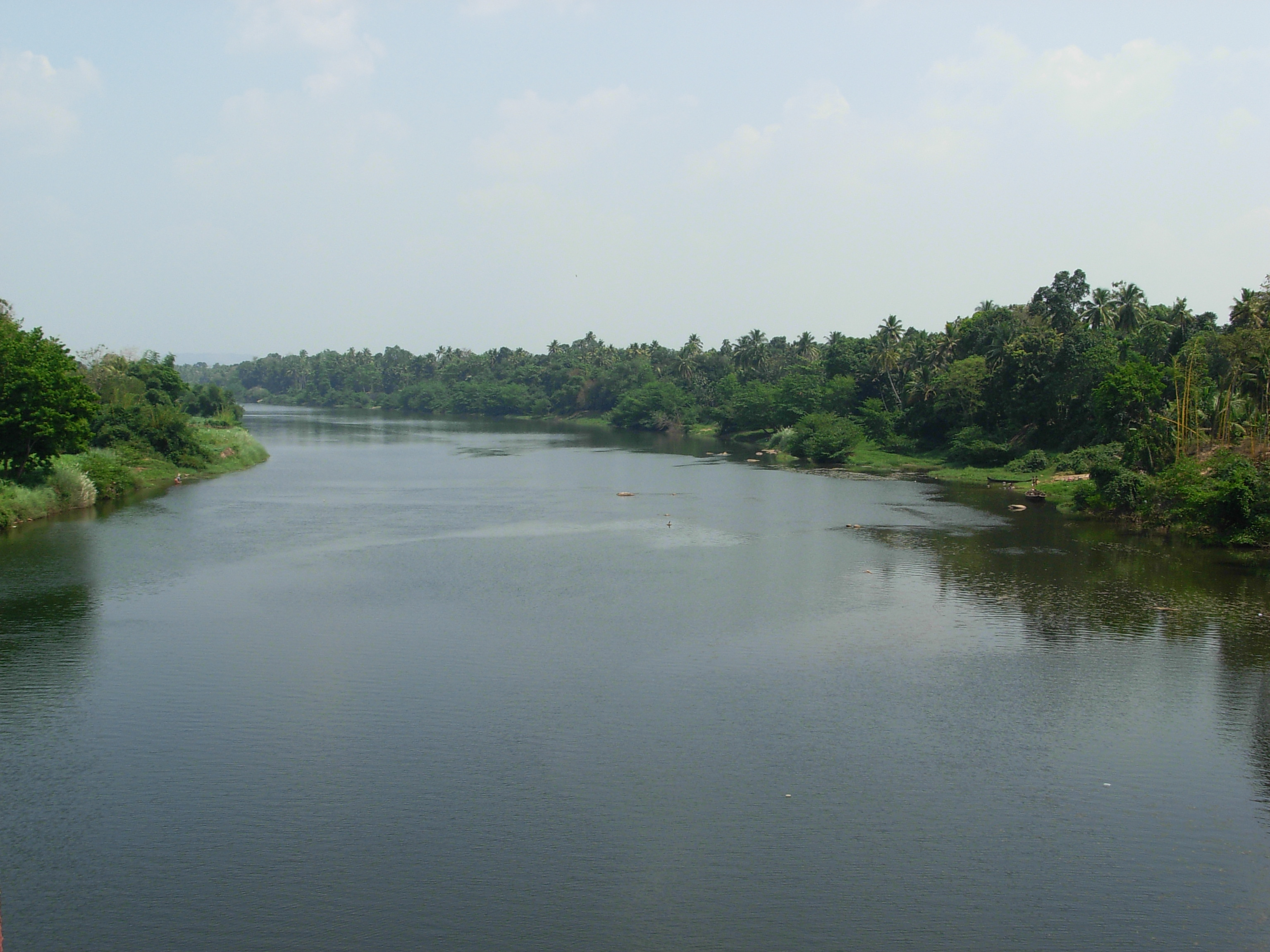 പമ്പാനദി. ആറന്മുളക്കടുത്തുള്ള ആറാട്ടുപുഴയിൽനിന്നുള്ള ദൃശ്യം